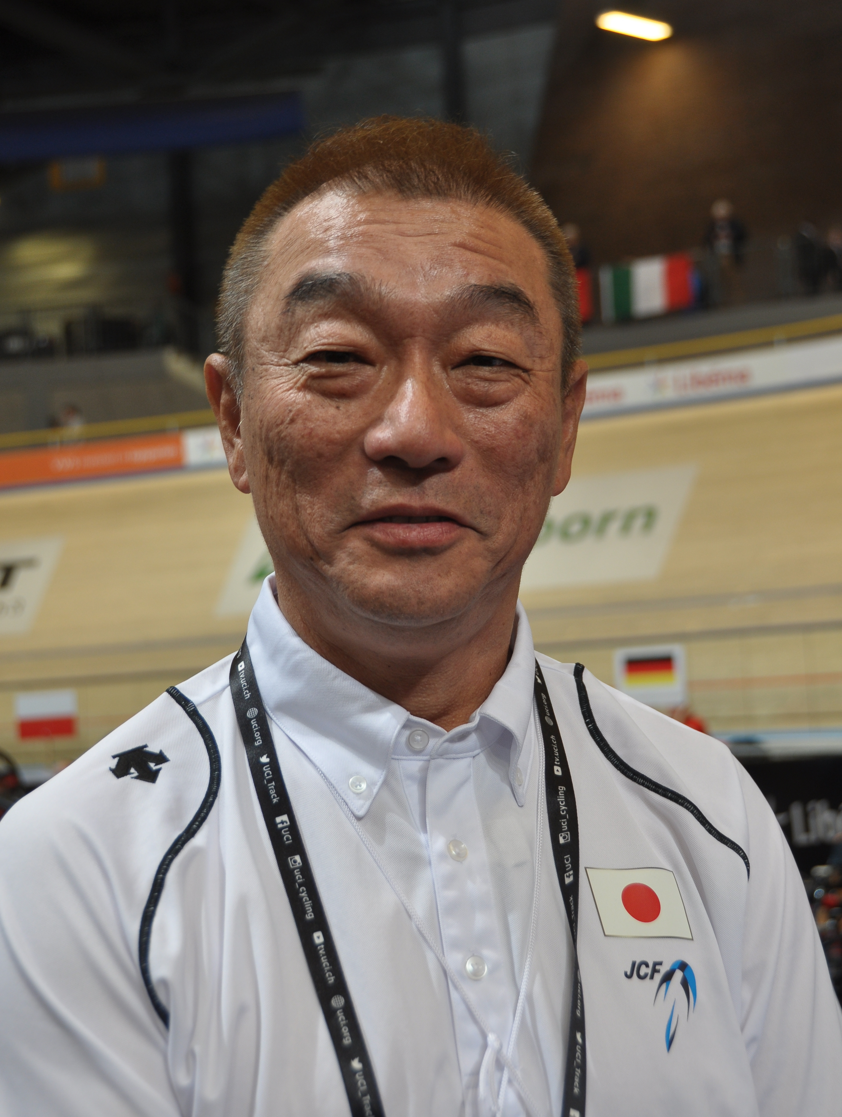 Kōichi Nakano, ehema. japanischer Radsportler